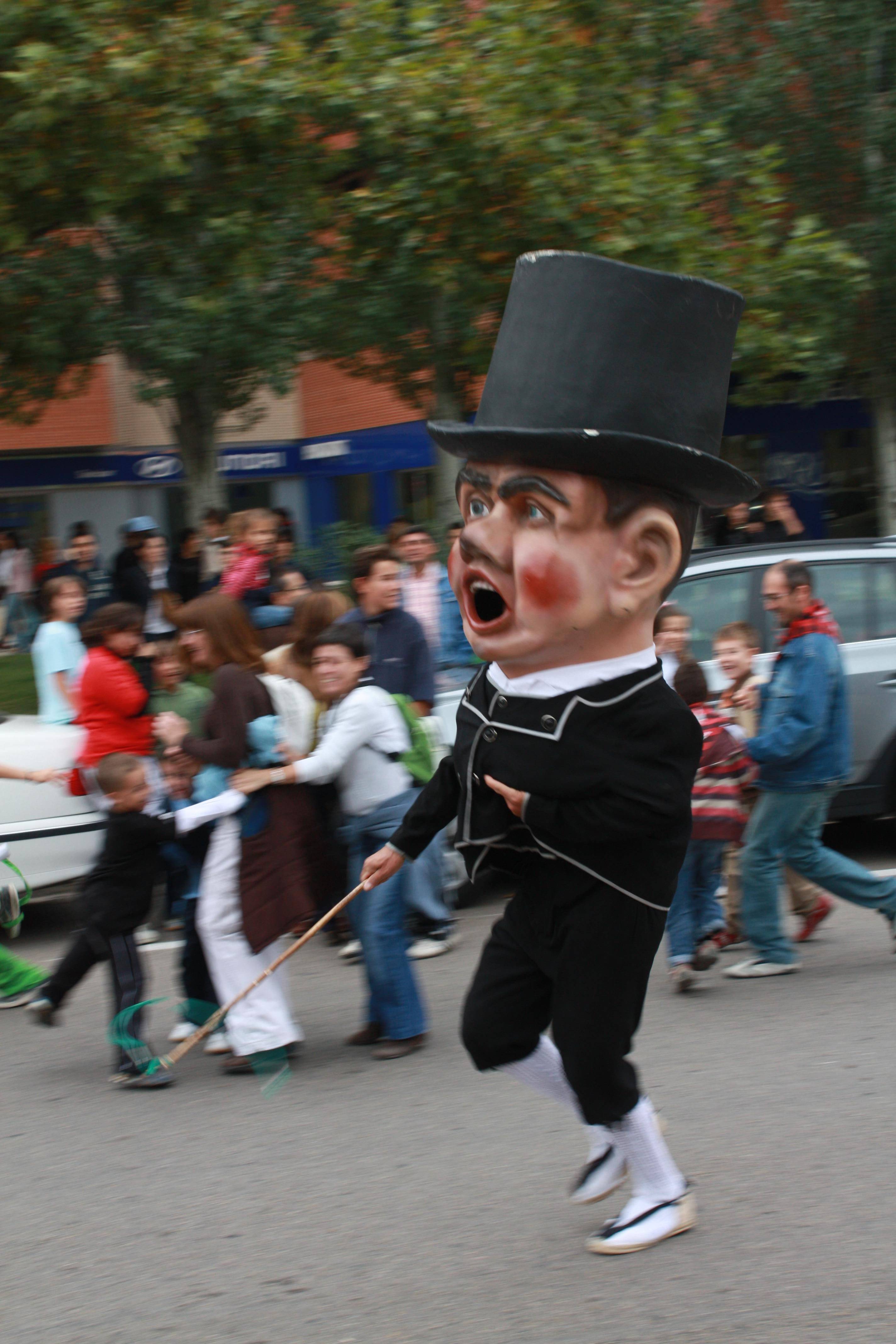 Cabezudos de Zaragoza. El Forano